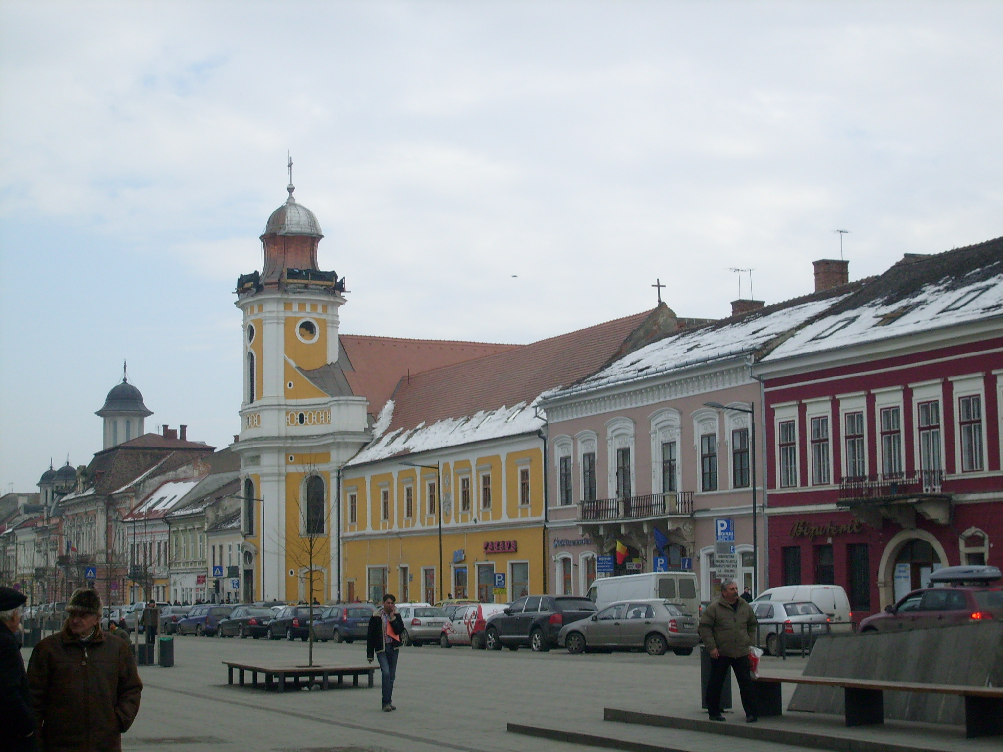 Biserica Minoriţilor din Cluj, astazi Catedrala Greco-Catolică Schimbarea la Faţă.